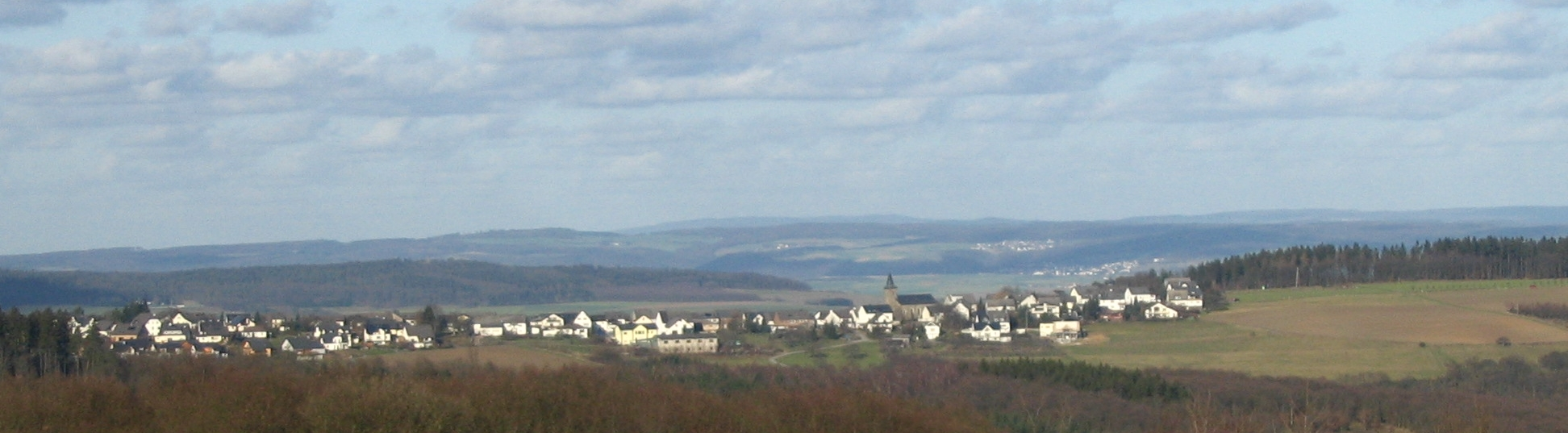 Perscheid im Hunsrück aus südlicher Richtung